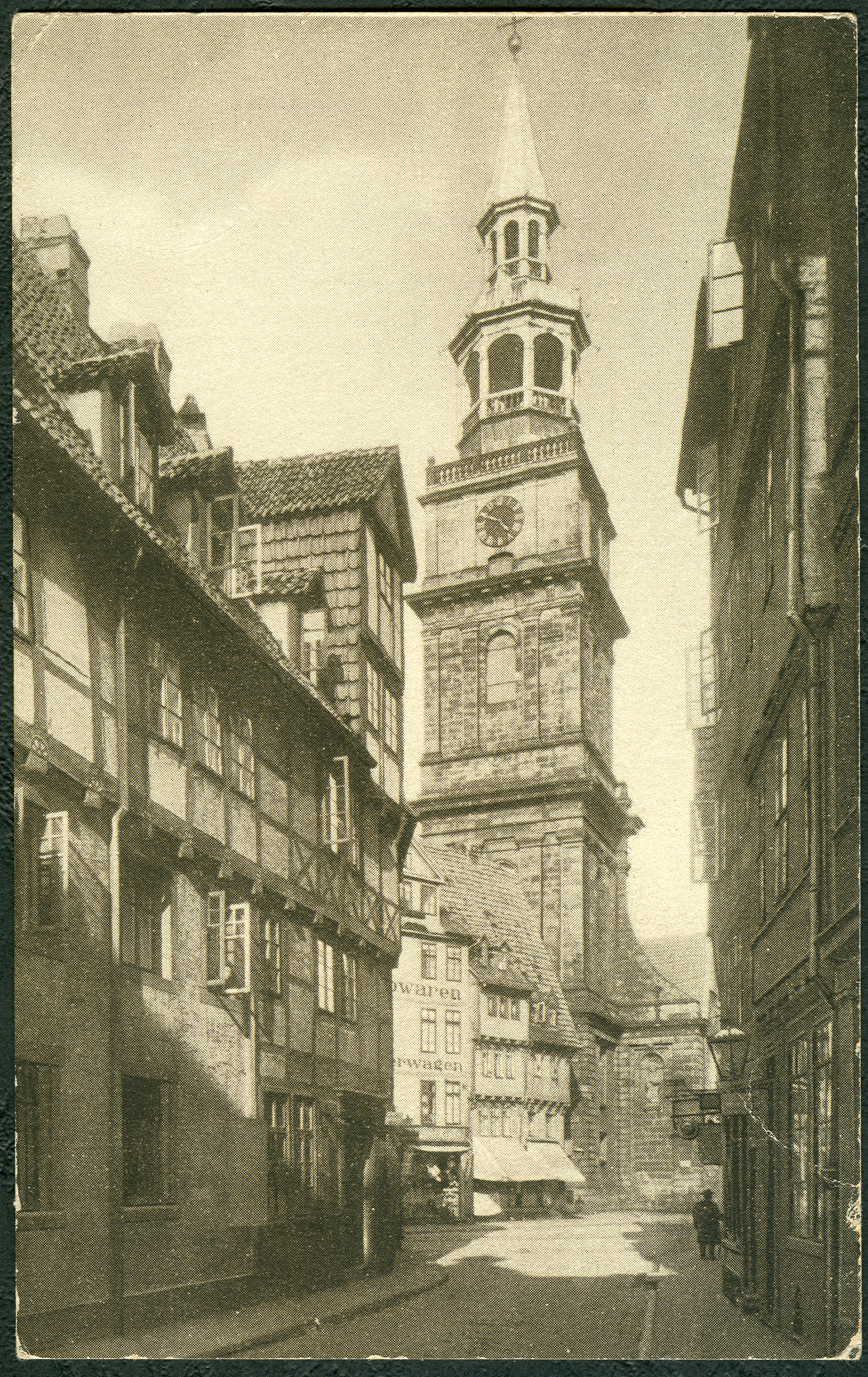 Von der Druckerei Edler & Krische gedruckte Ansichtskarte eines anonymen Fotografen mit Blick durch das (ehemalige) Ende der Köbelingerstraße mit ihren Fachwerkhäusern auf die noch unzerstörte Aegidienkirche ...